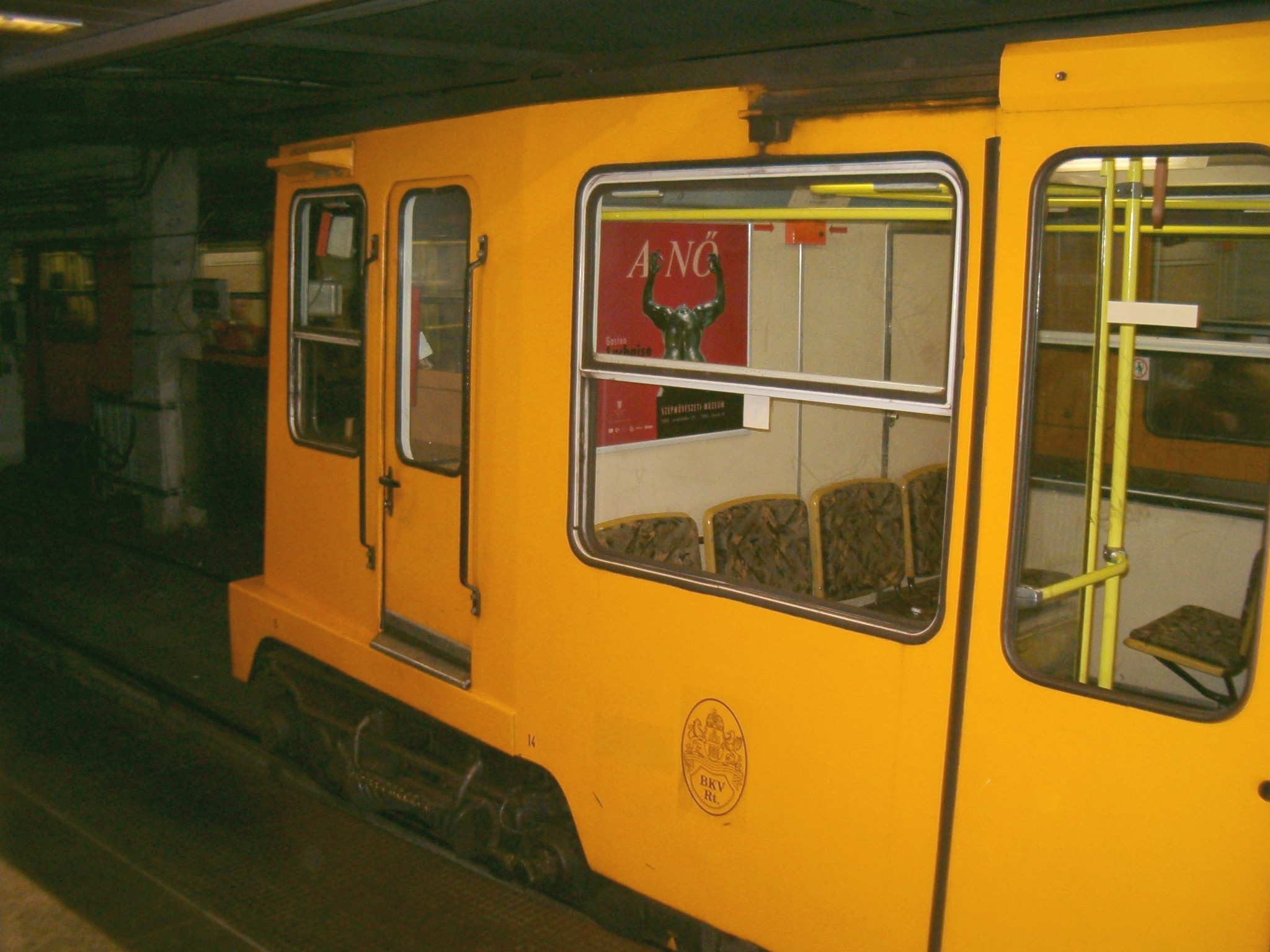 M1 Metro, Budapest.